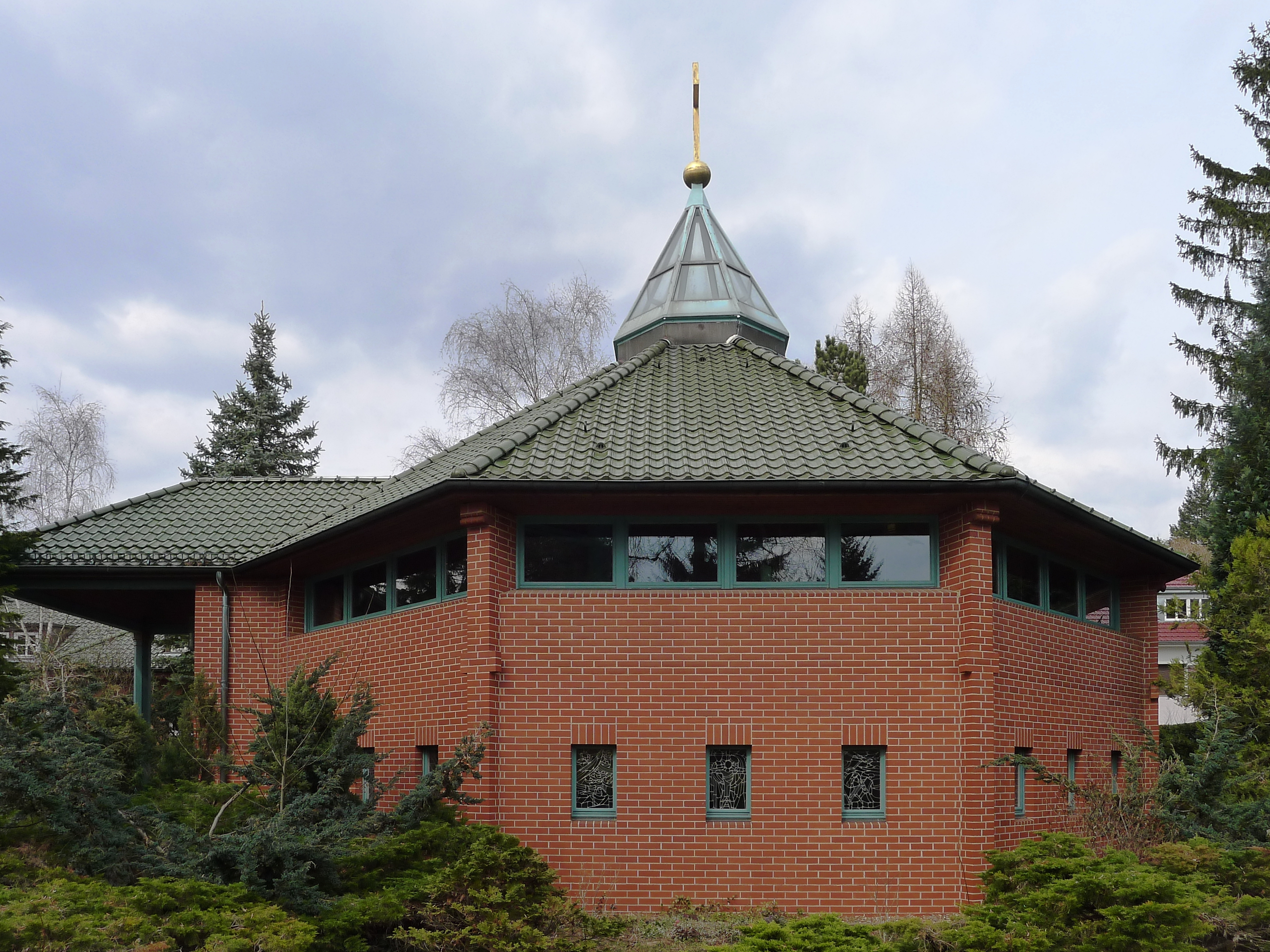 Blick auf die Kirche von der Straße aus